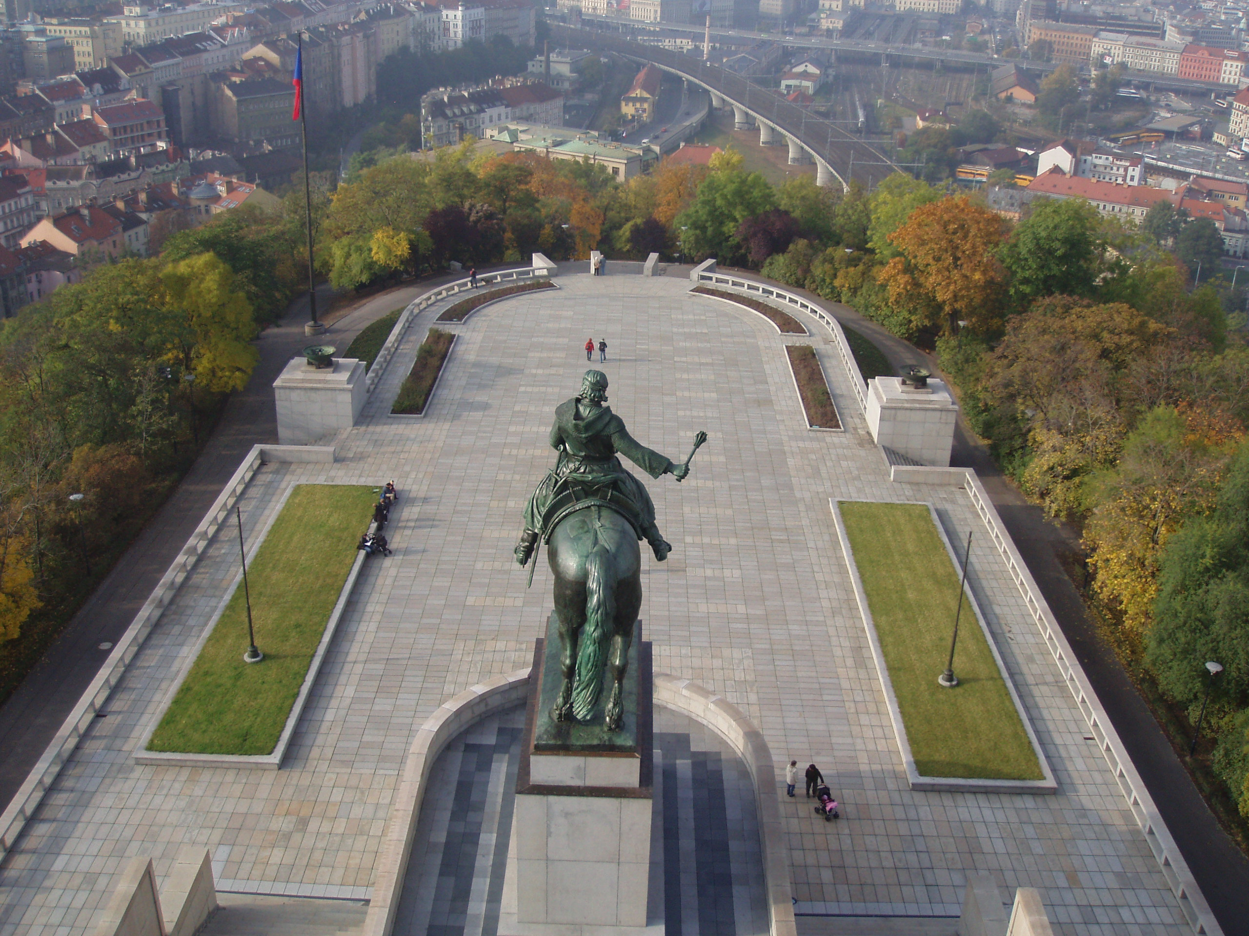 Pohled z žižkovského památníku